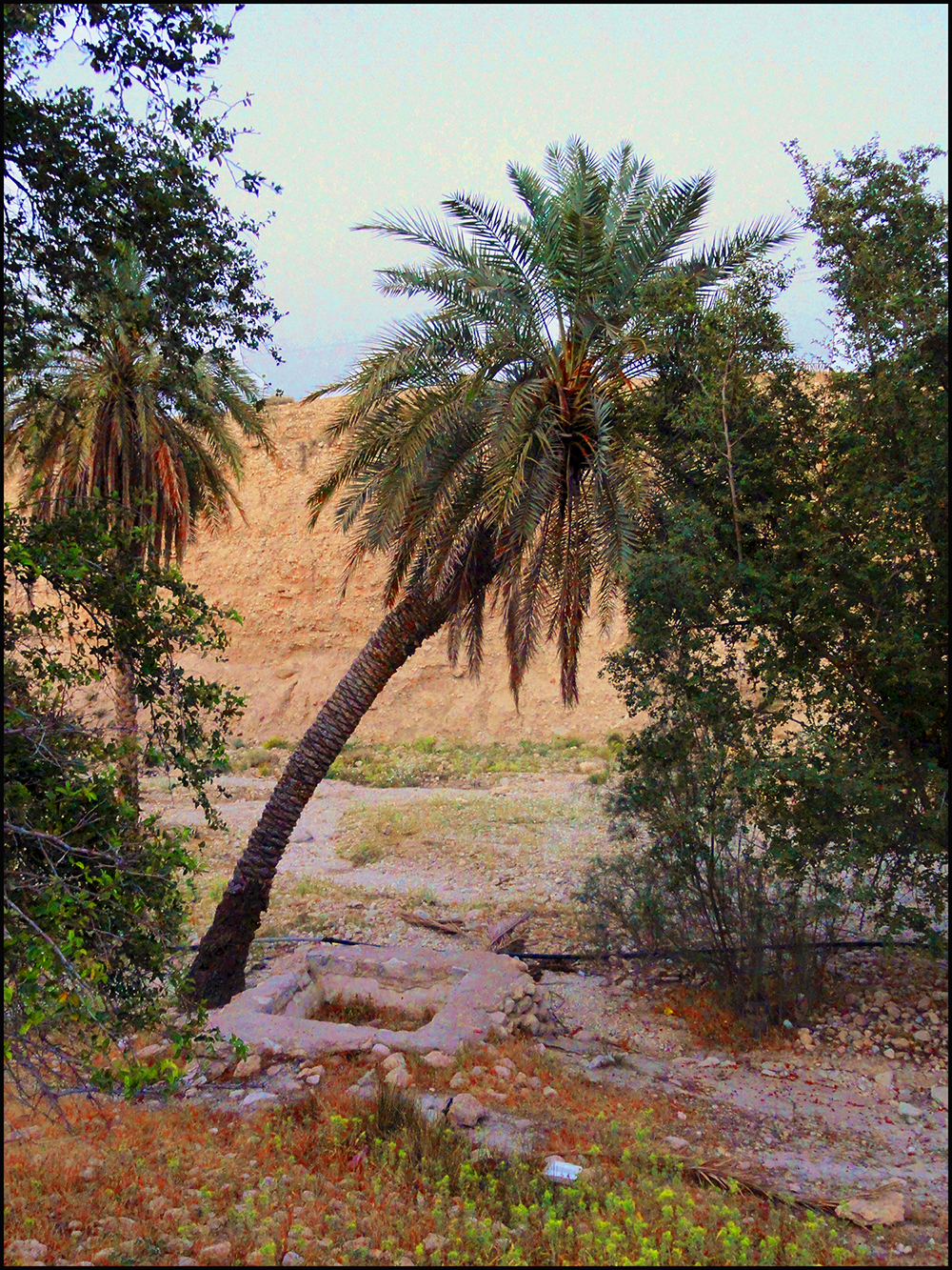 نخلستان امامزاده گل علی. دهستان خبرگو. بخش علامرودشت. شهرستان لامرد. استان فارس